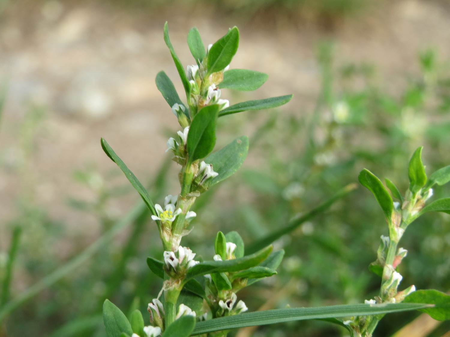 Vogelknöterich (Polygonum aviculare) bei St. Leon-Rot